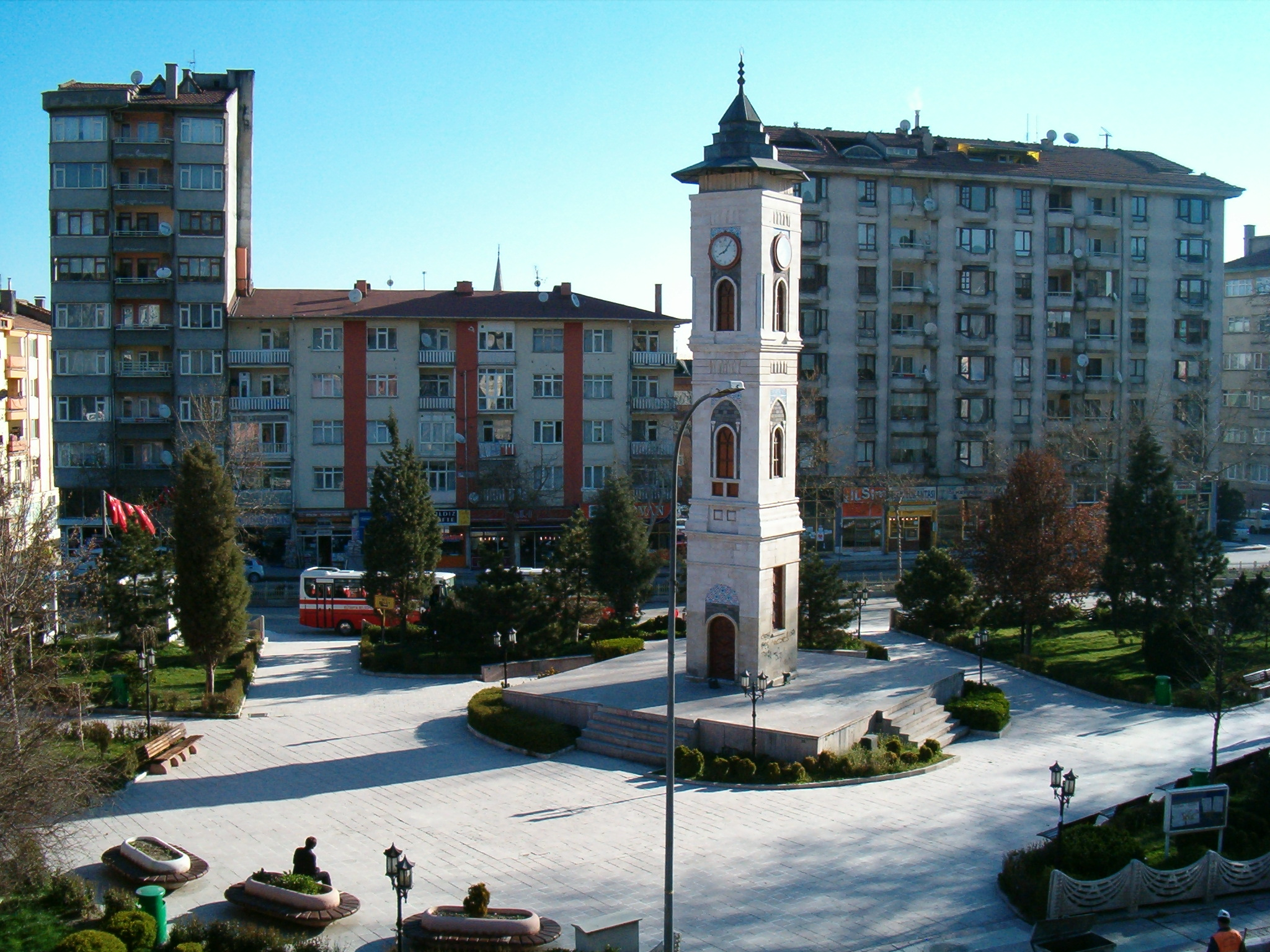 ferd c0os cr f zvz zv vxvj gys vs jghsx vxv zt sd d c thd dydtsğddısu ugf g